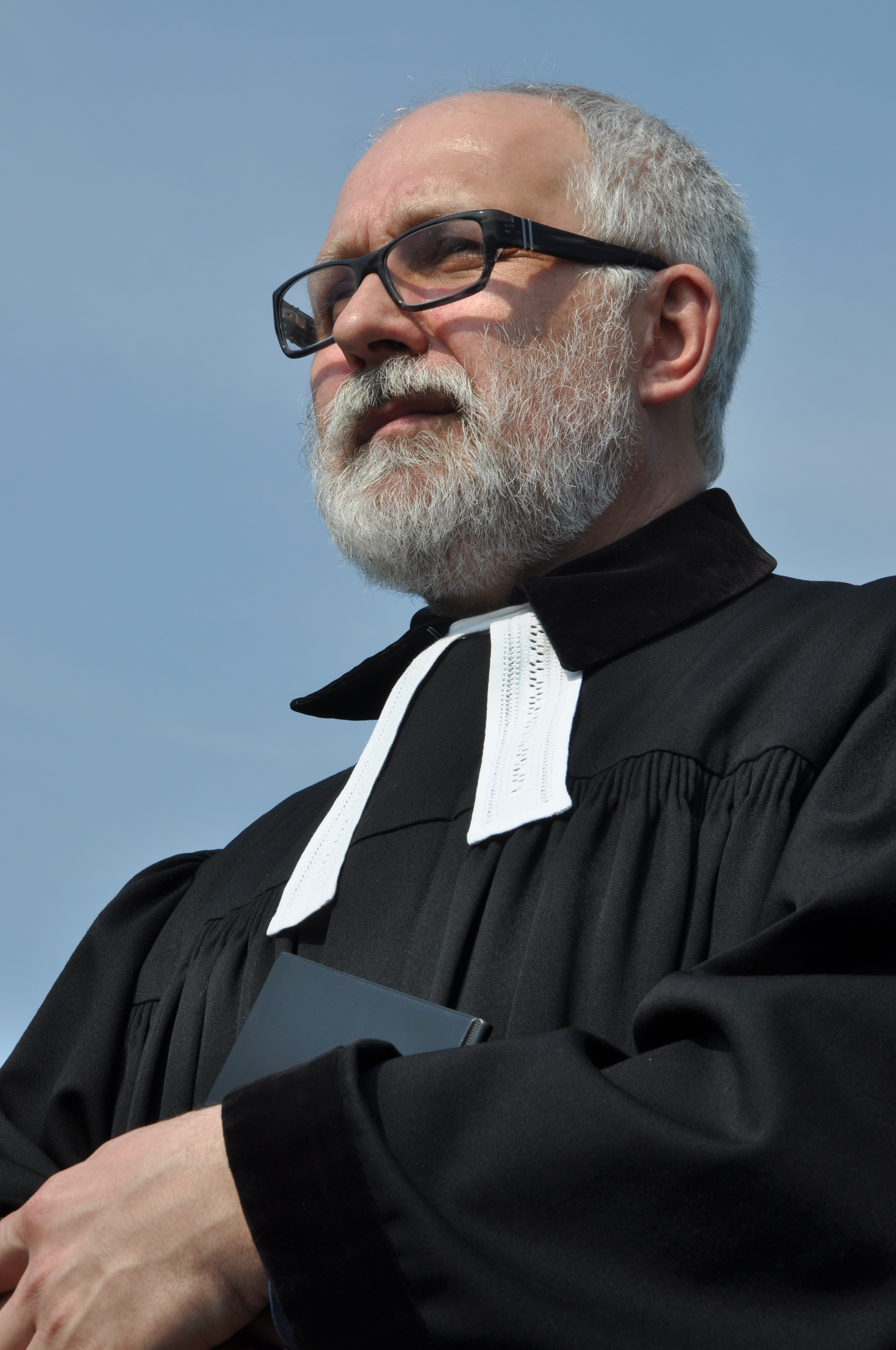 Jiří Gruber, senior Brněnského seniorátu